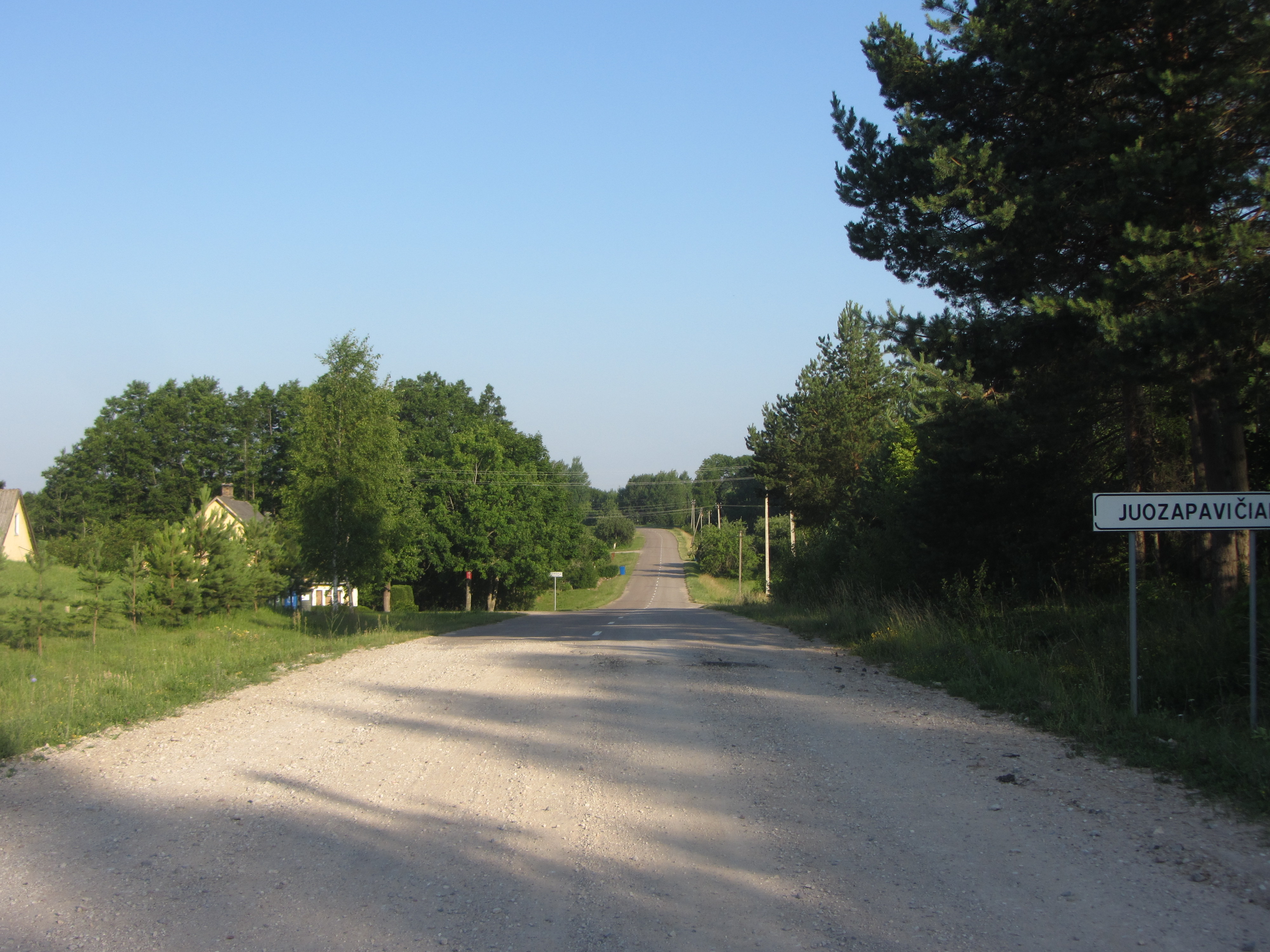 Noragėliai, Lithuania